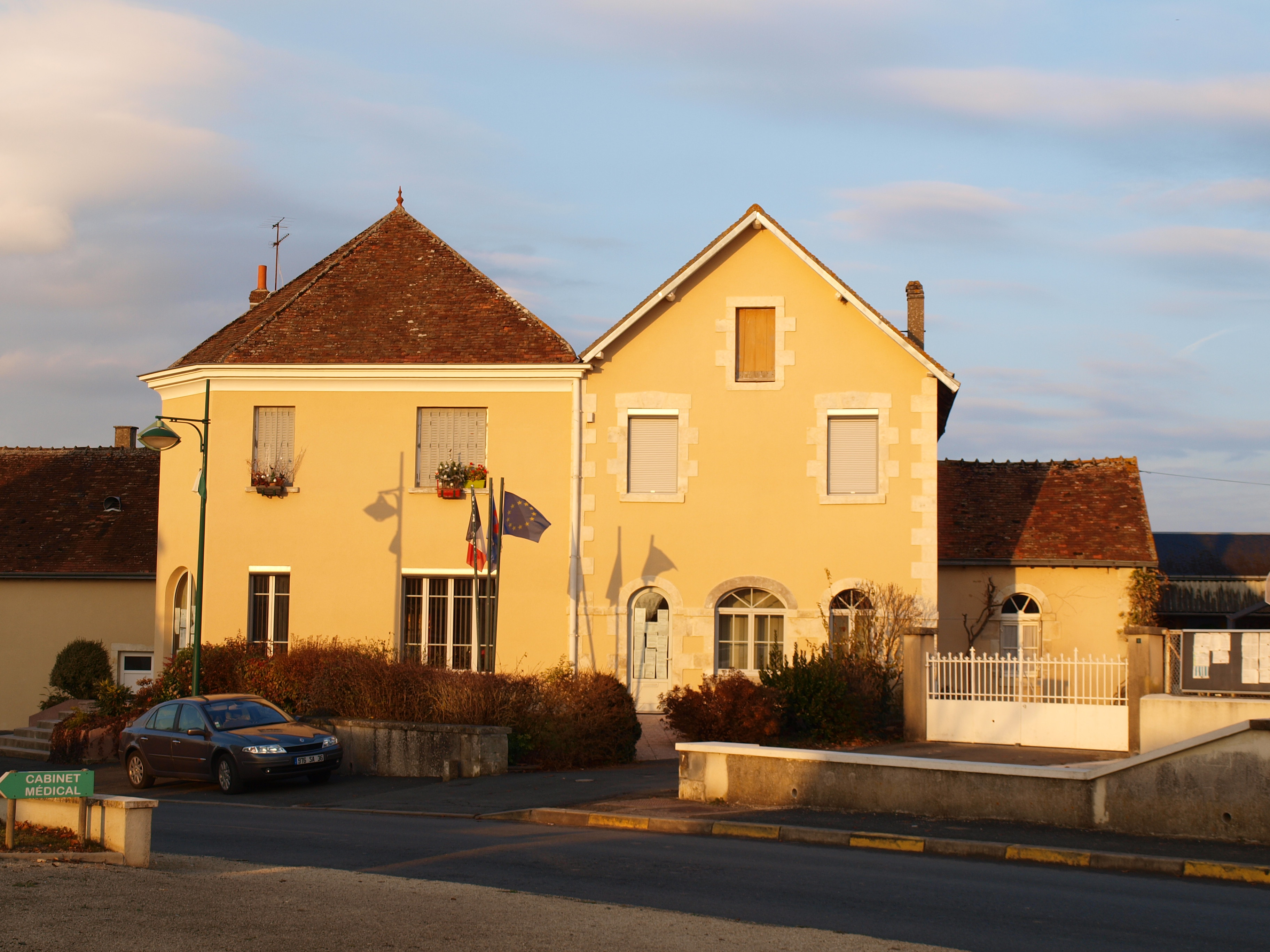 Velles (Indre, France) ; mairie